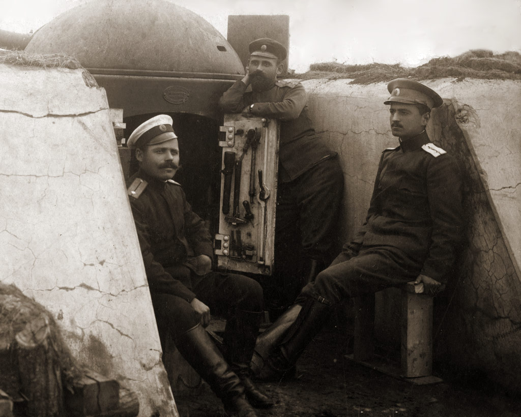 Offizier und Kanoniere vor einem Kuppelgeschütz, System Gruson